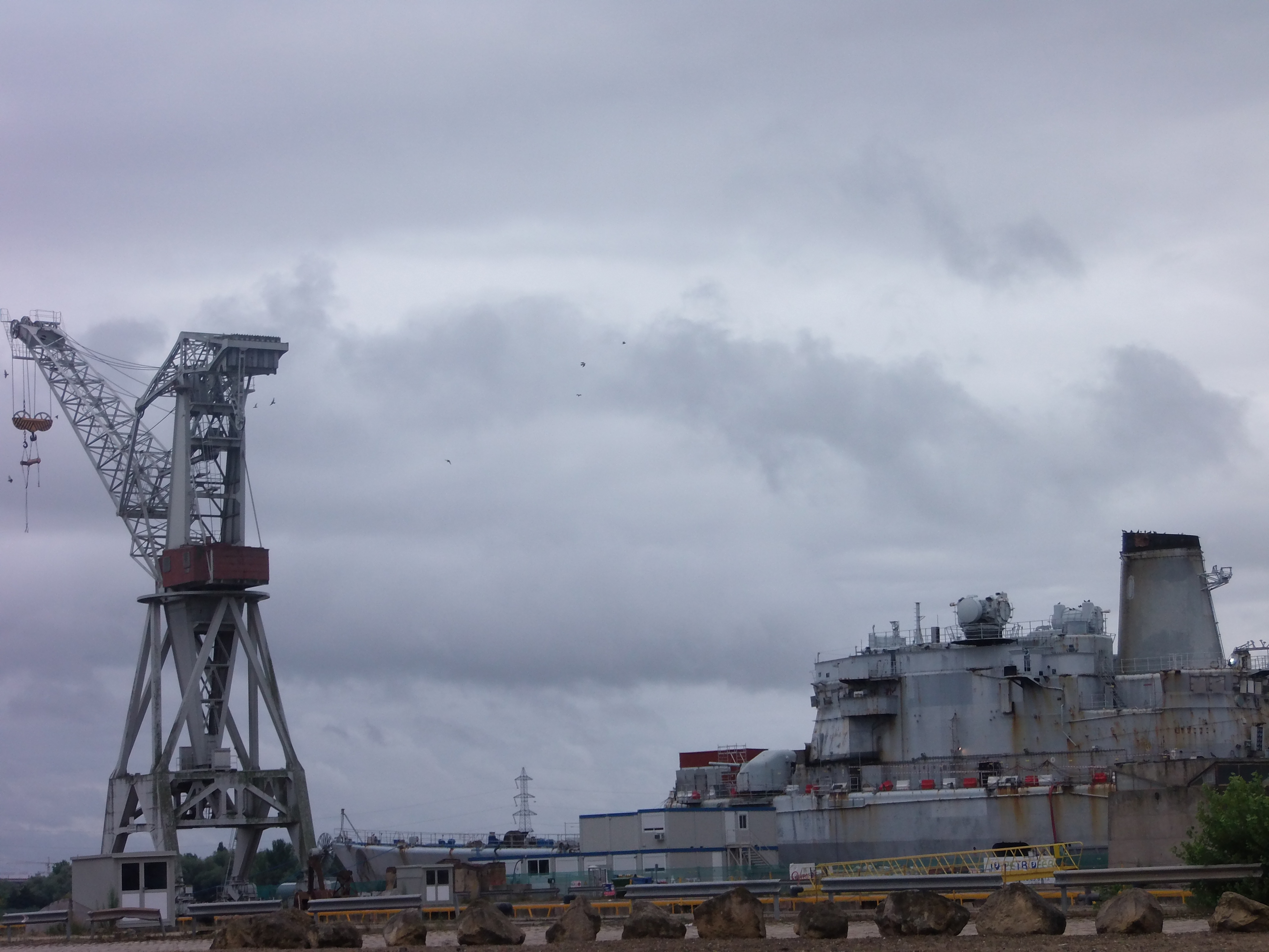 La Jeanne d'Arc (porte-hélicoptères) en déconstruction au port de Bassens (Gironde, France). Ancien bâtiment de la Marine nationale française, porte-hélicoptères et navire-école. Arrivé de Brest le 14 octobre 2014.